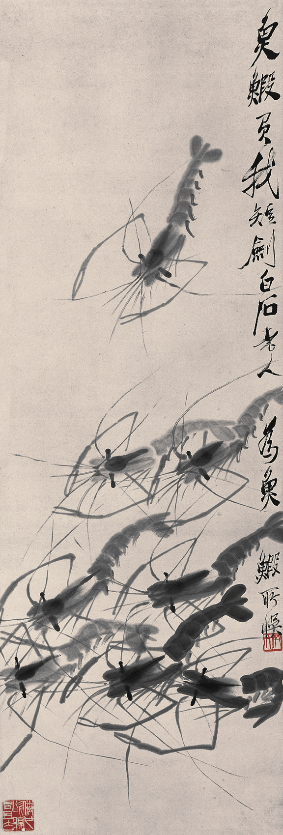 齊白石墨蝦圖，102.5×34.5 cm，上書：鱼虾负我短剑。白石老人为鱼虾所悮。印：“齐大”、“倦也欲瞑君且去”